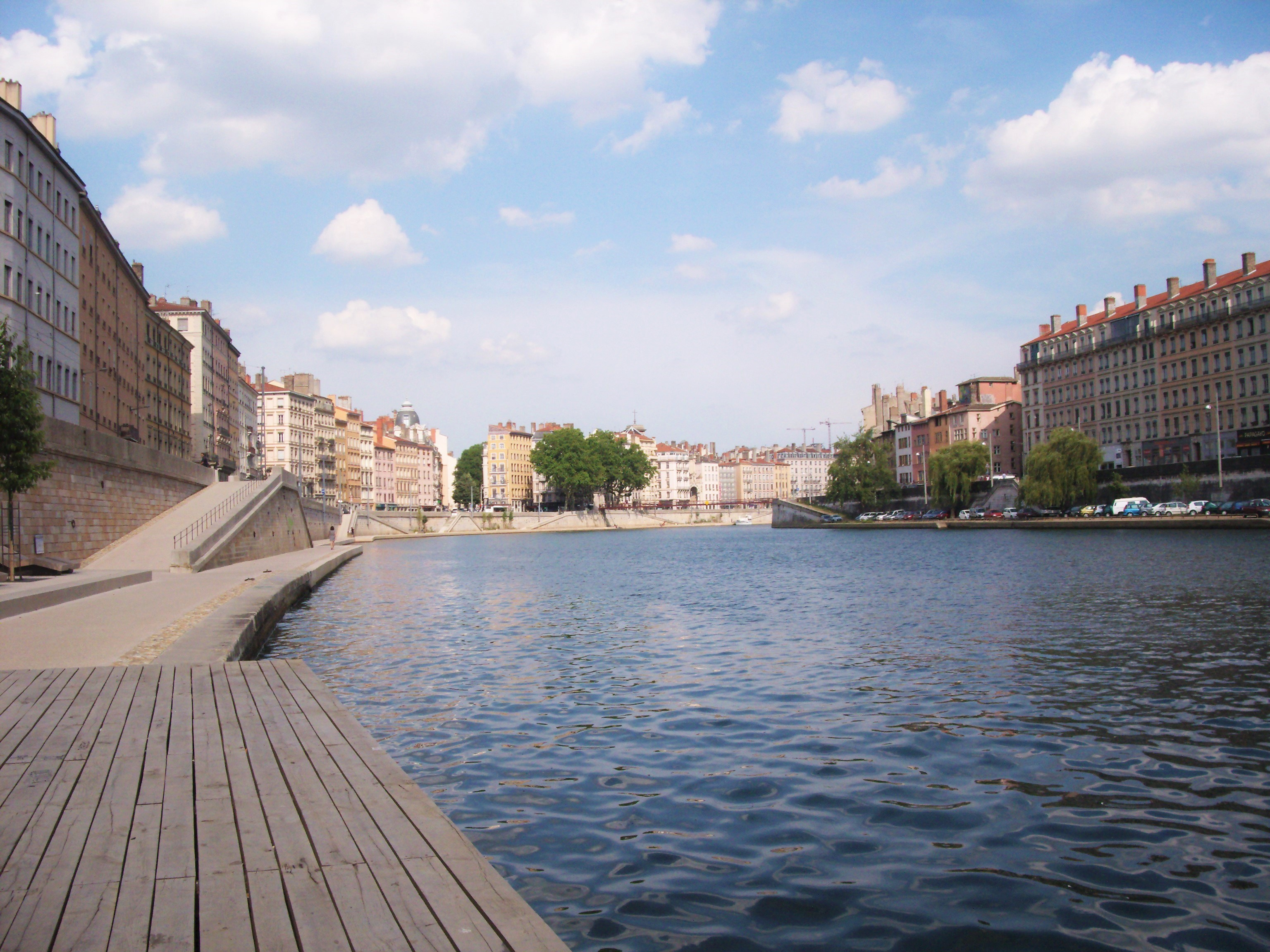 La Saône entre Fourvière et la Croix-Rousse.